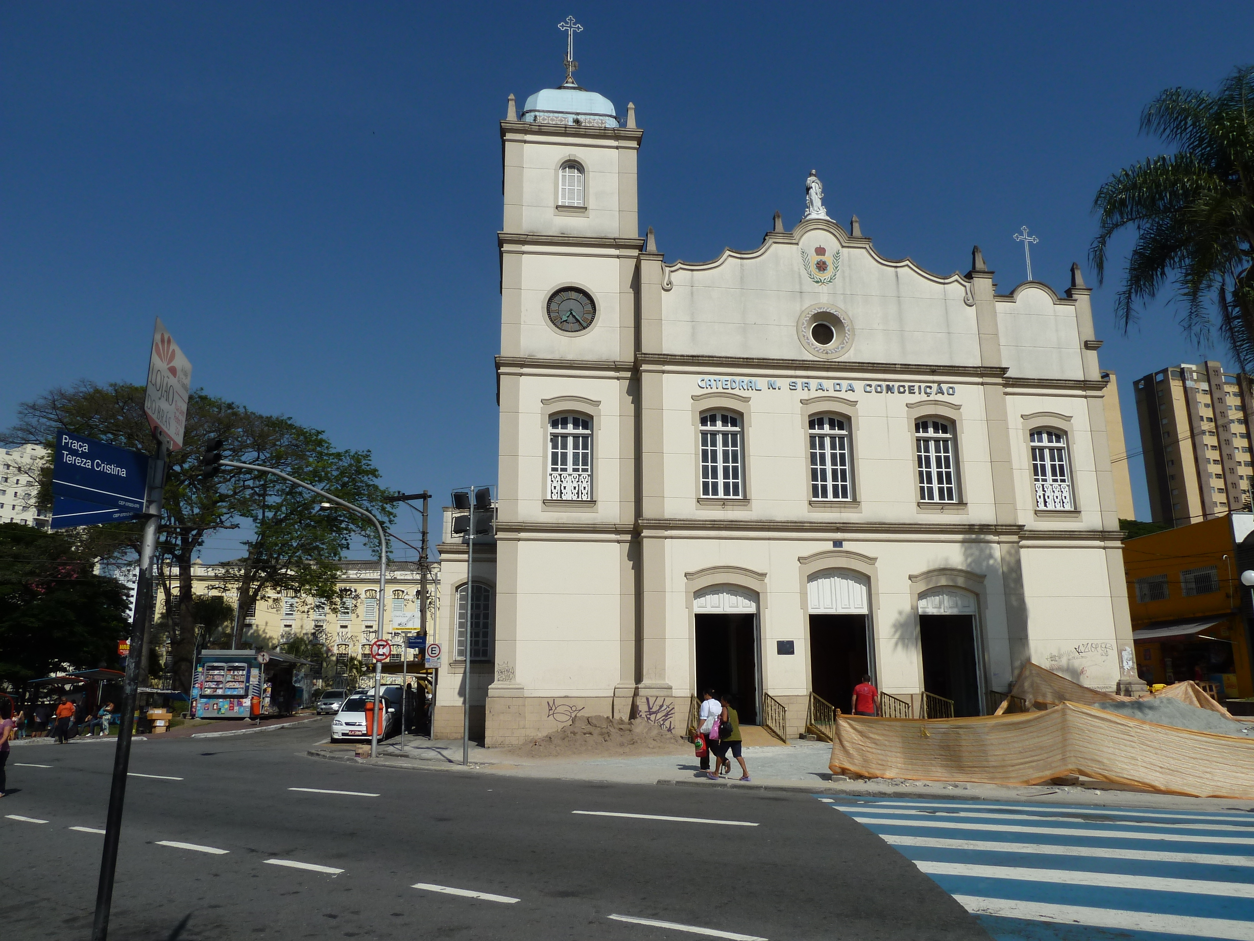 Guarulhos, Igreja Matriz, Pça. Tereza Cristina